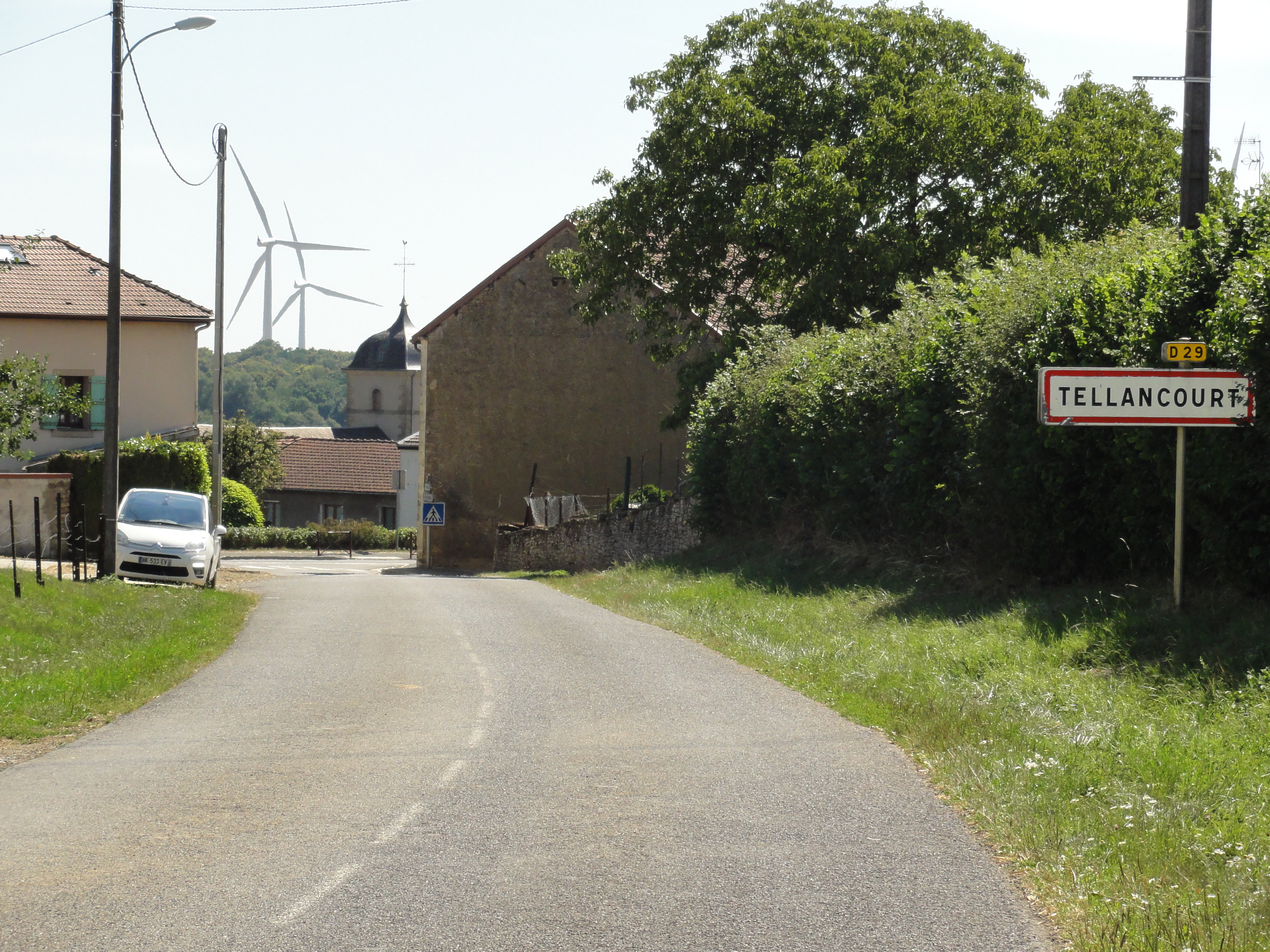 Tellancourt (Meurthe-et-M.) city limit sign